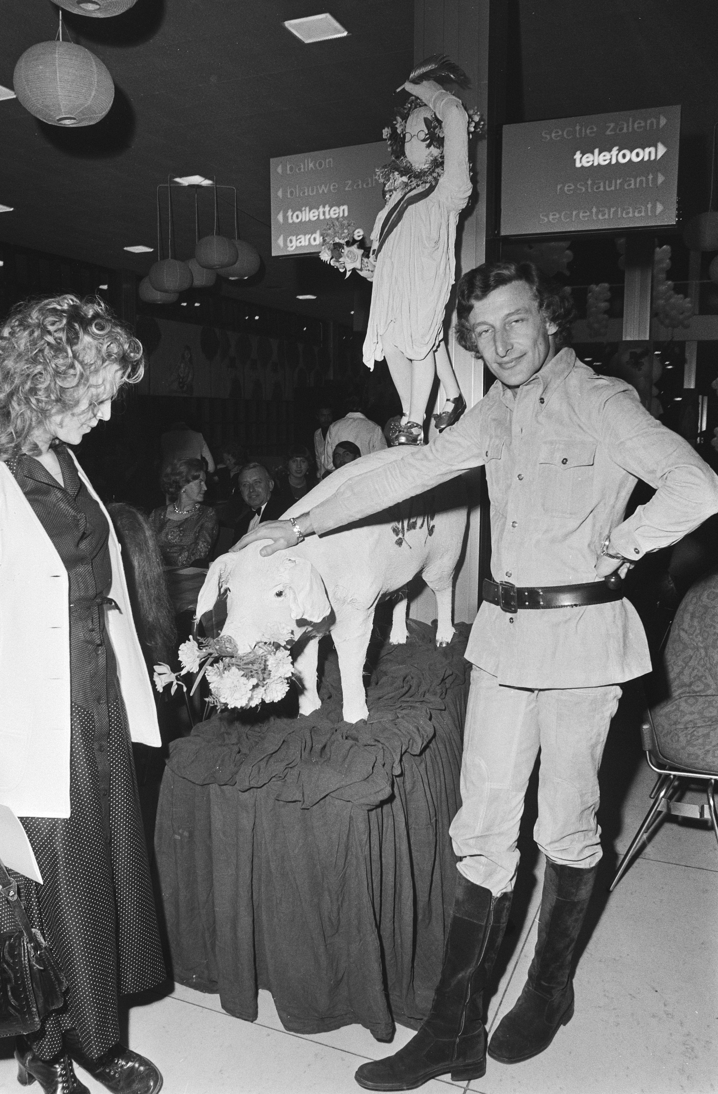 Boekenbal in de RAI te Amsterdam; Harry Mulisch poseert bij het "varken". Amsterdam, 31 maart 1971